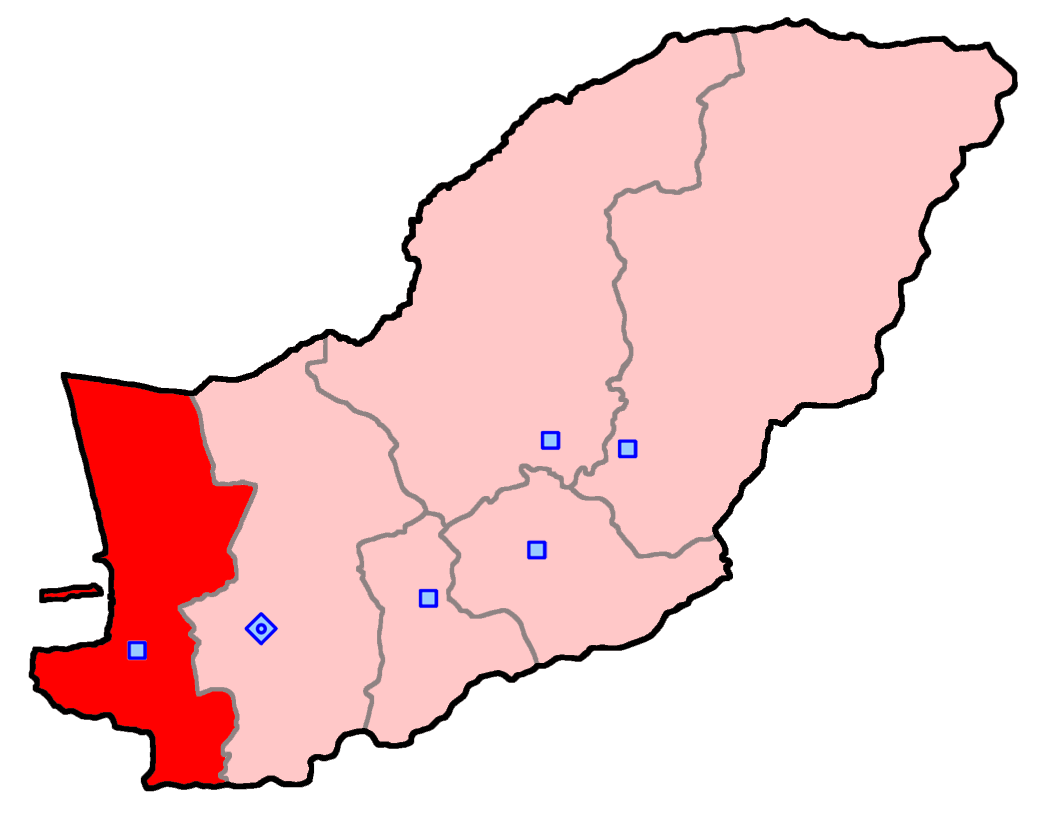 حوزه‌ کردکوی برای انتخابات مجلس شورای اسلامی